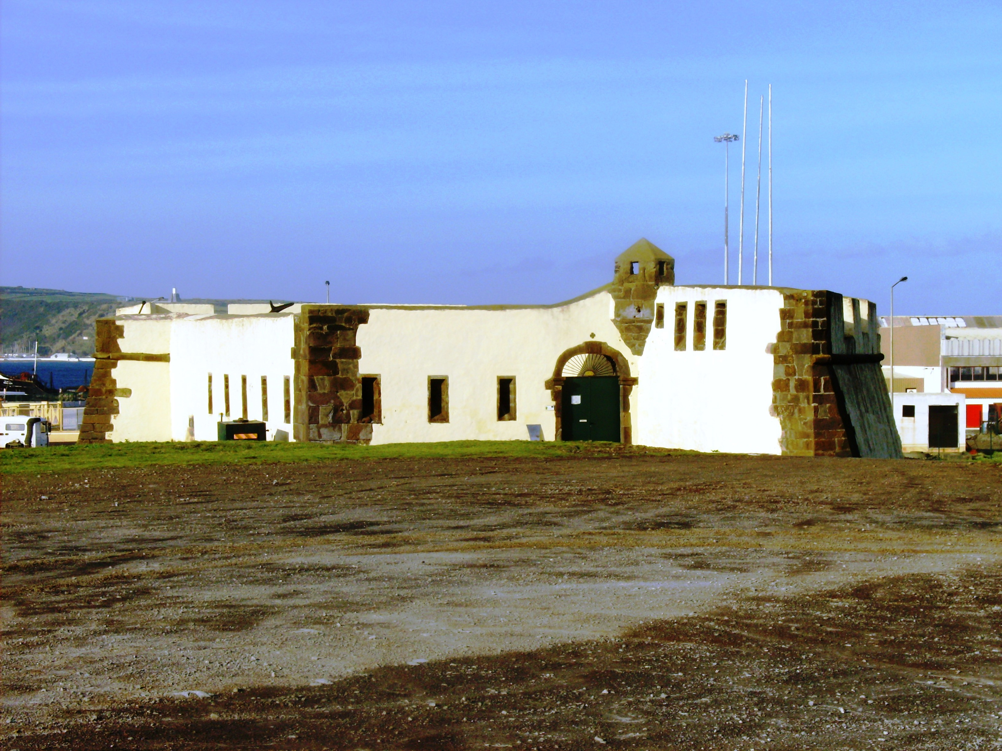 Forte de Santa Catarina (Cabo da Praia), Praia da Vitória, Ilha Terceira, Portugal.